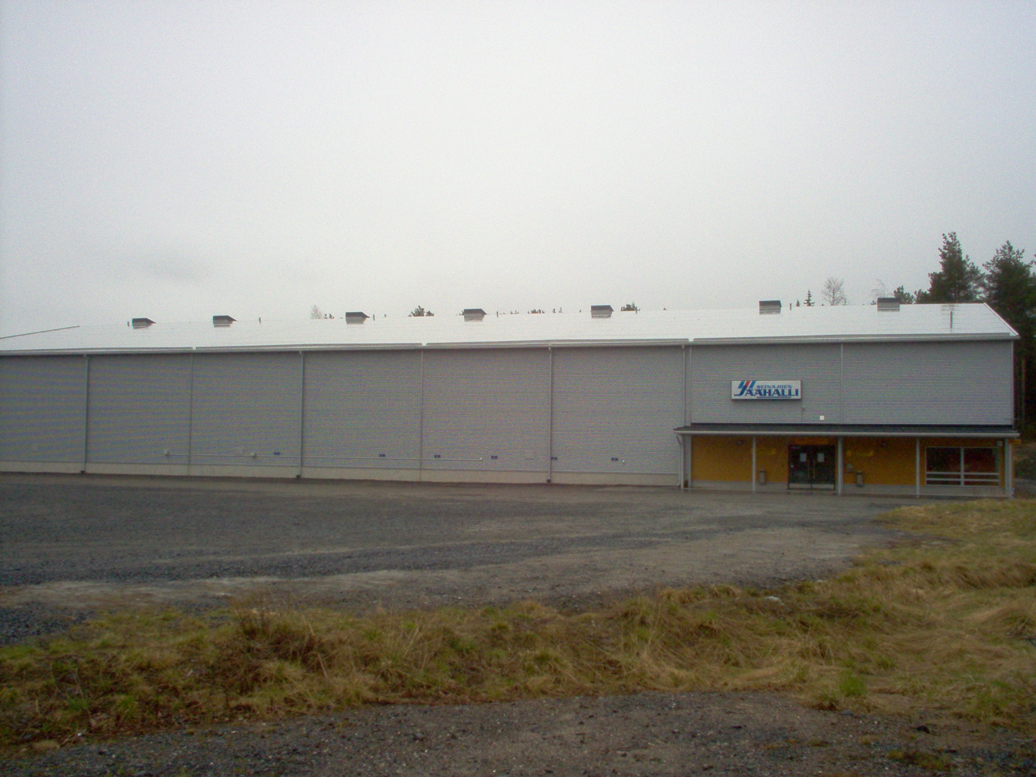 Seinäjoen jäähalli.